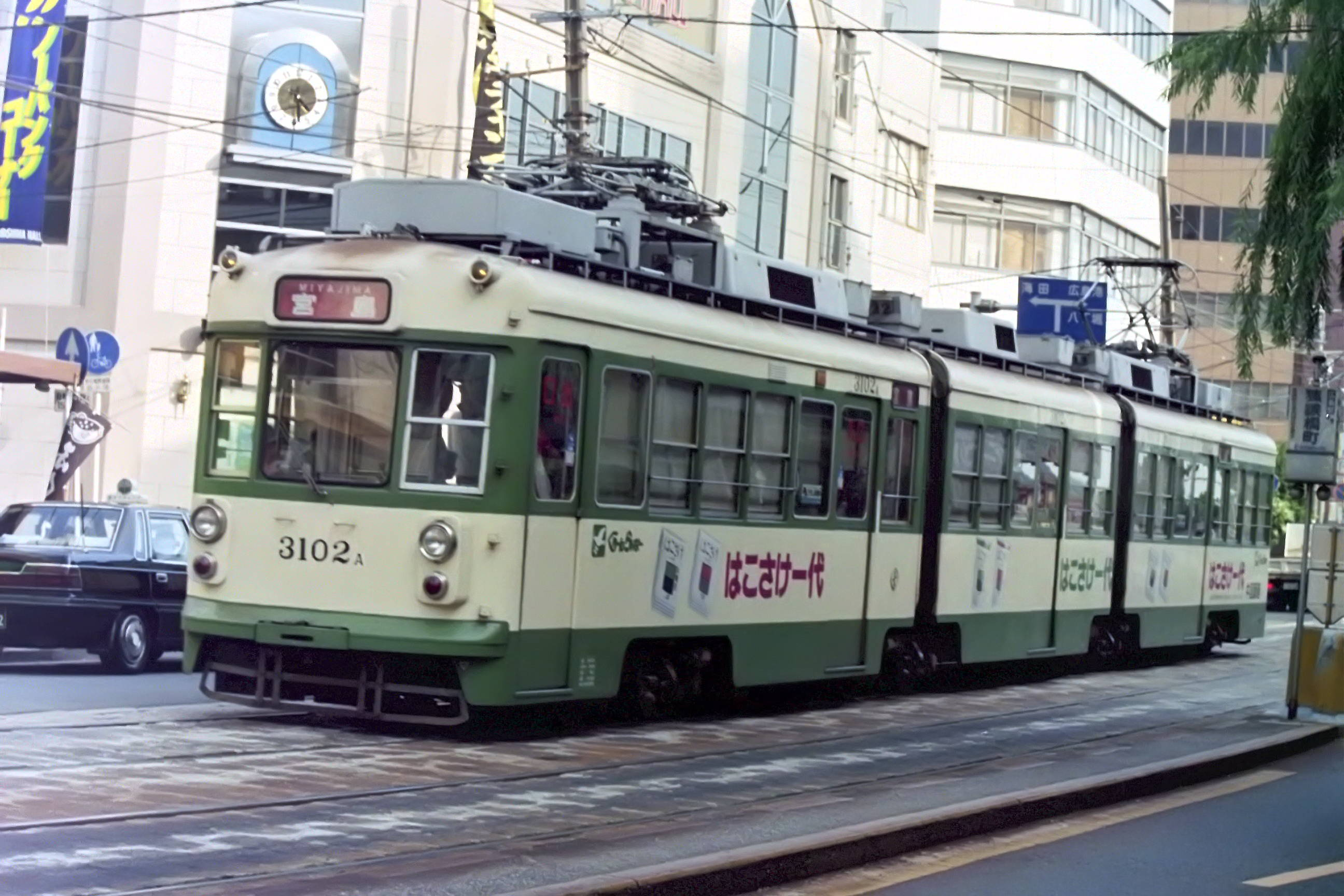 広島電鉄 3102